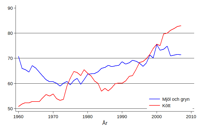 Totalkonsumtionen av mjöl och gryn eller kött mätt i liter eller kg per person per år. "Med totalkonsumtion avses den totala åtgången av olika råvaror för humankonsumtion." - SCB